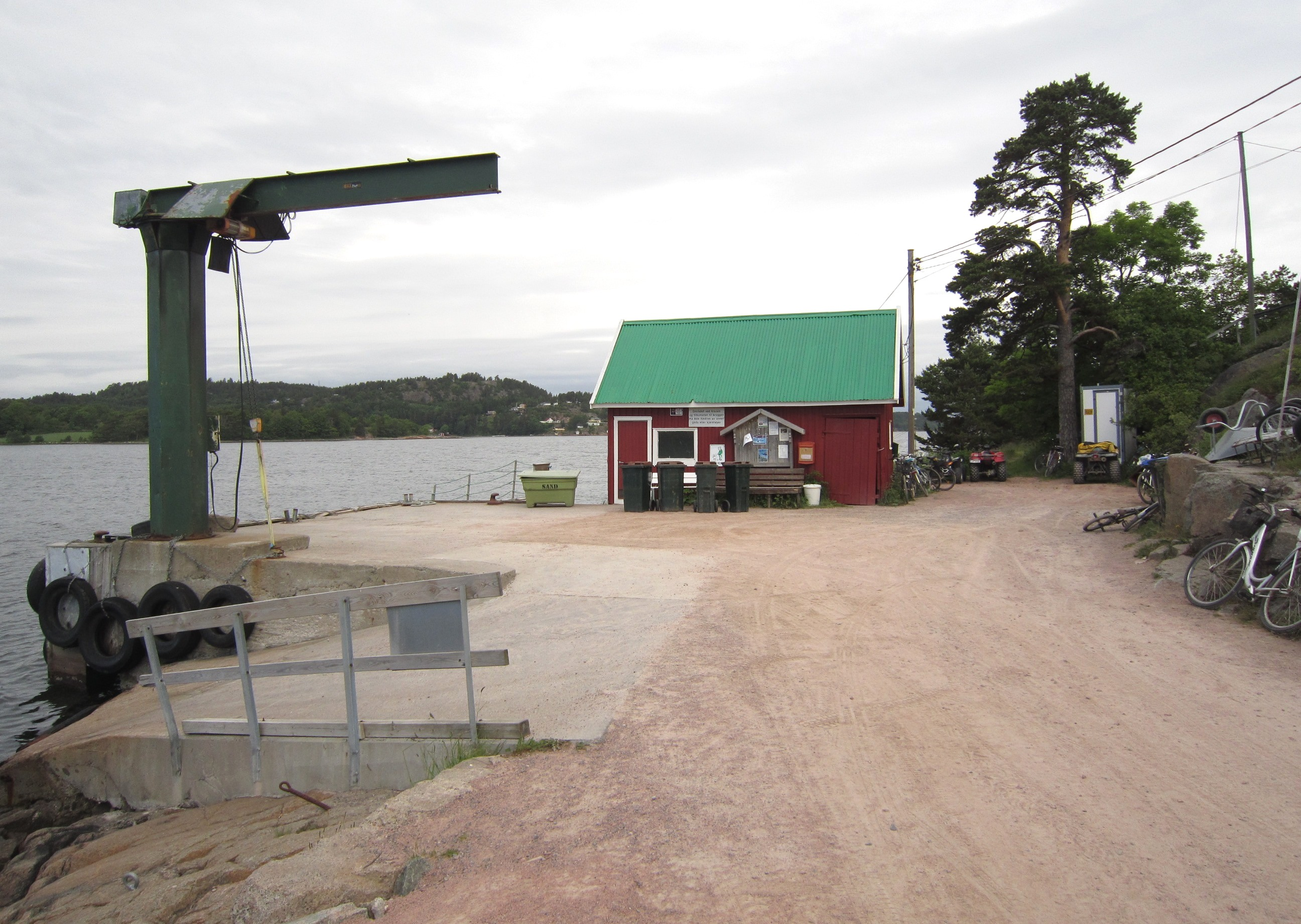 Fergekaia på Veierland